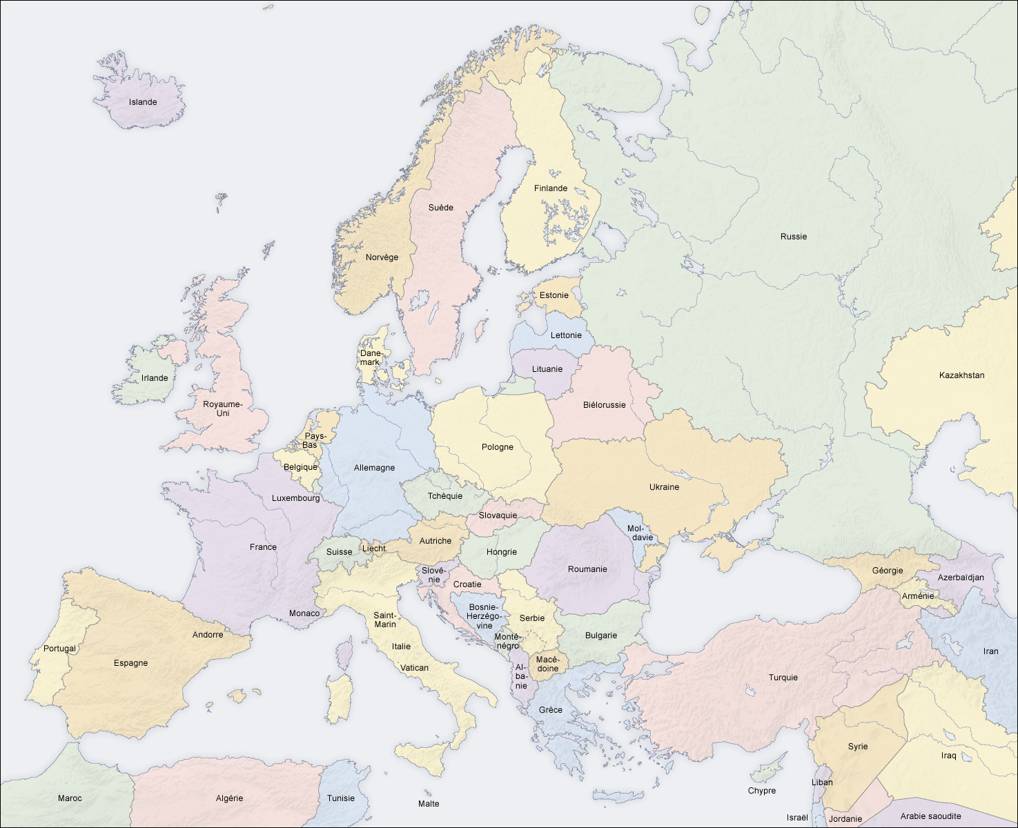 pays en Europe, carte fr